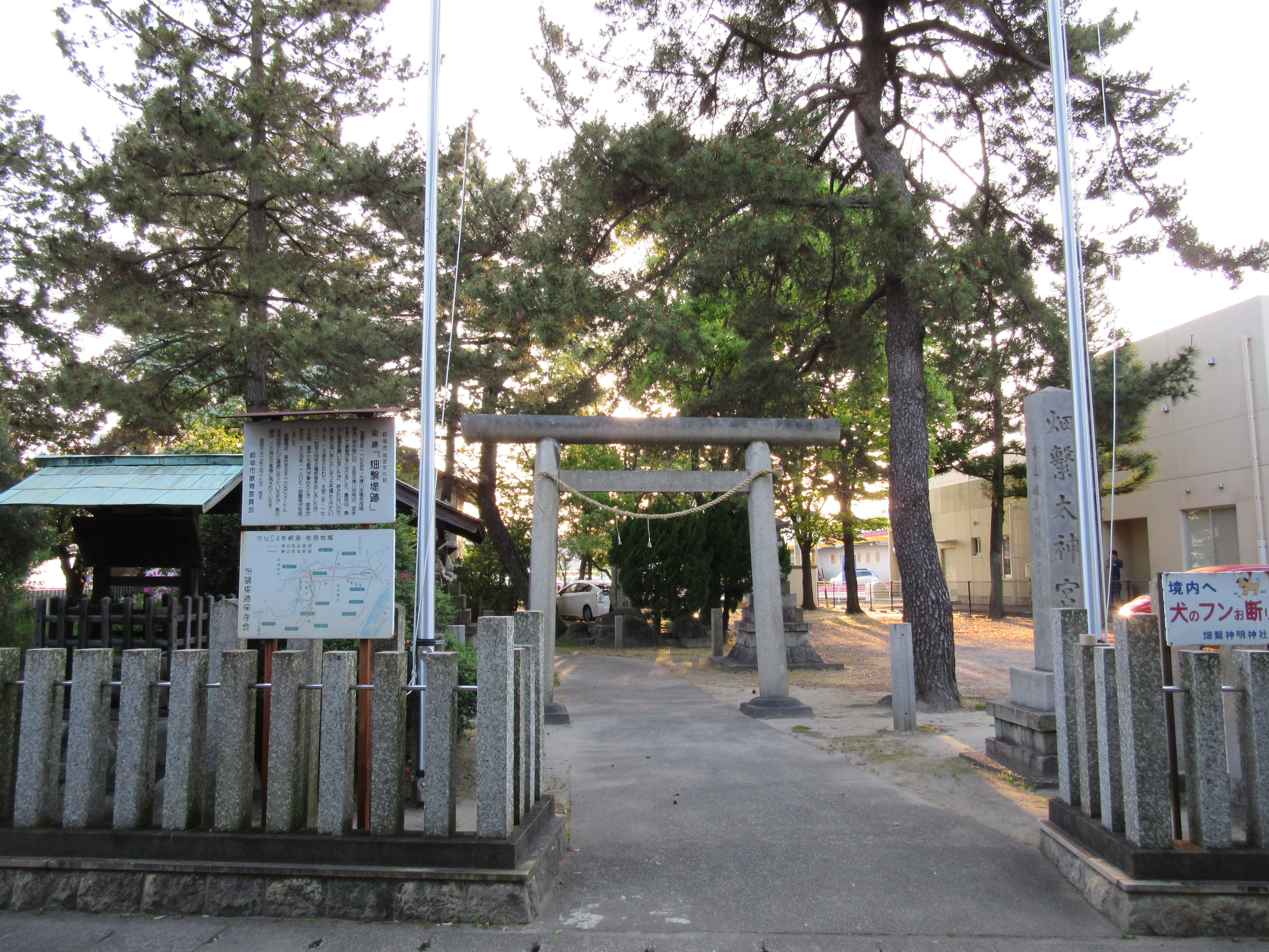 畑繋大神宮